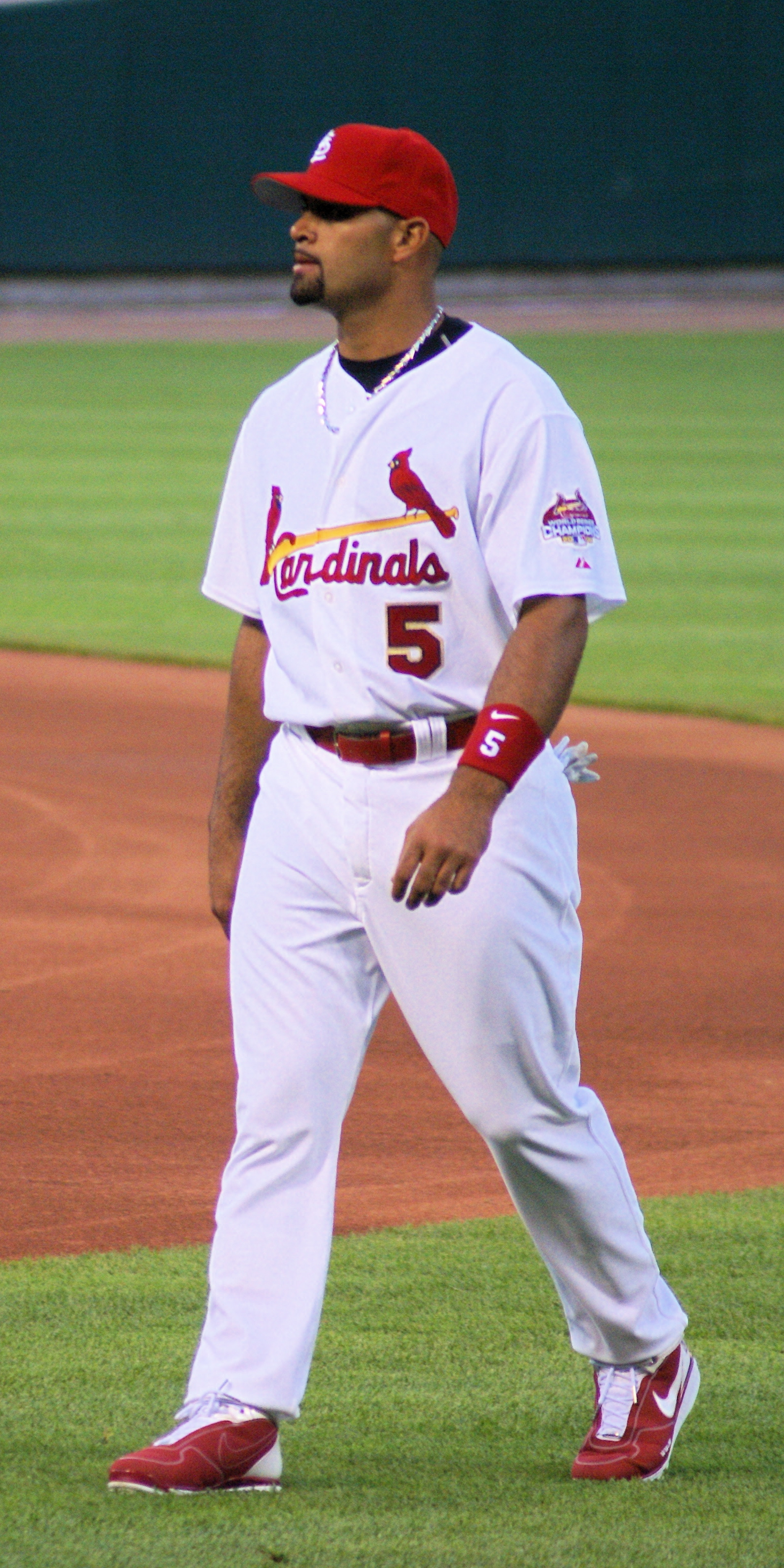 Albert Pujols